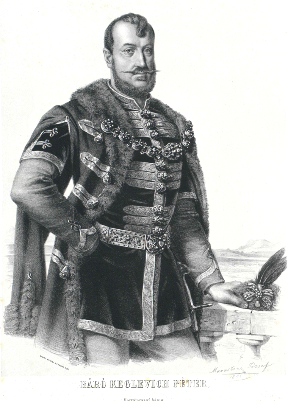 Keglevich Péter vagy Keglevics (horvátul Petar Keglević, teljes nevén Petar Keglević od Bužima) (1485. k. – 1554. v. 1555?) horvát-szlavón bán Nádasdy Tamással együtt 1533 és 1554 között.